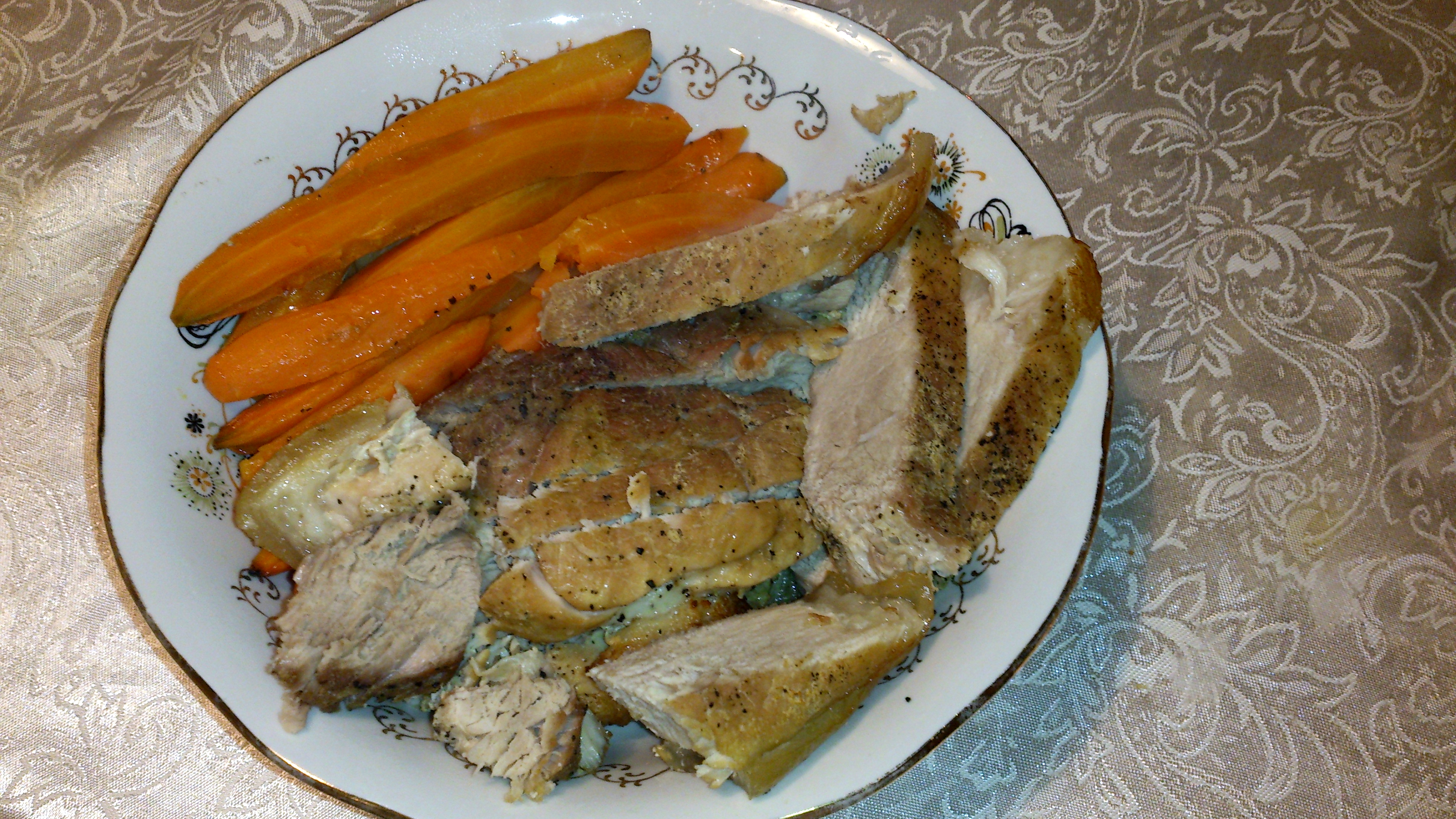 Seapraad ahjuporganditega